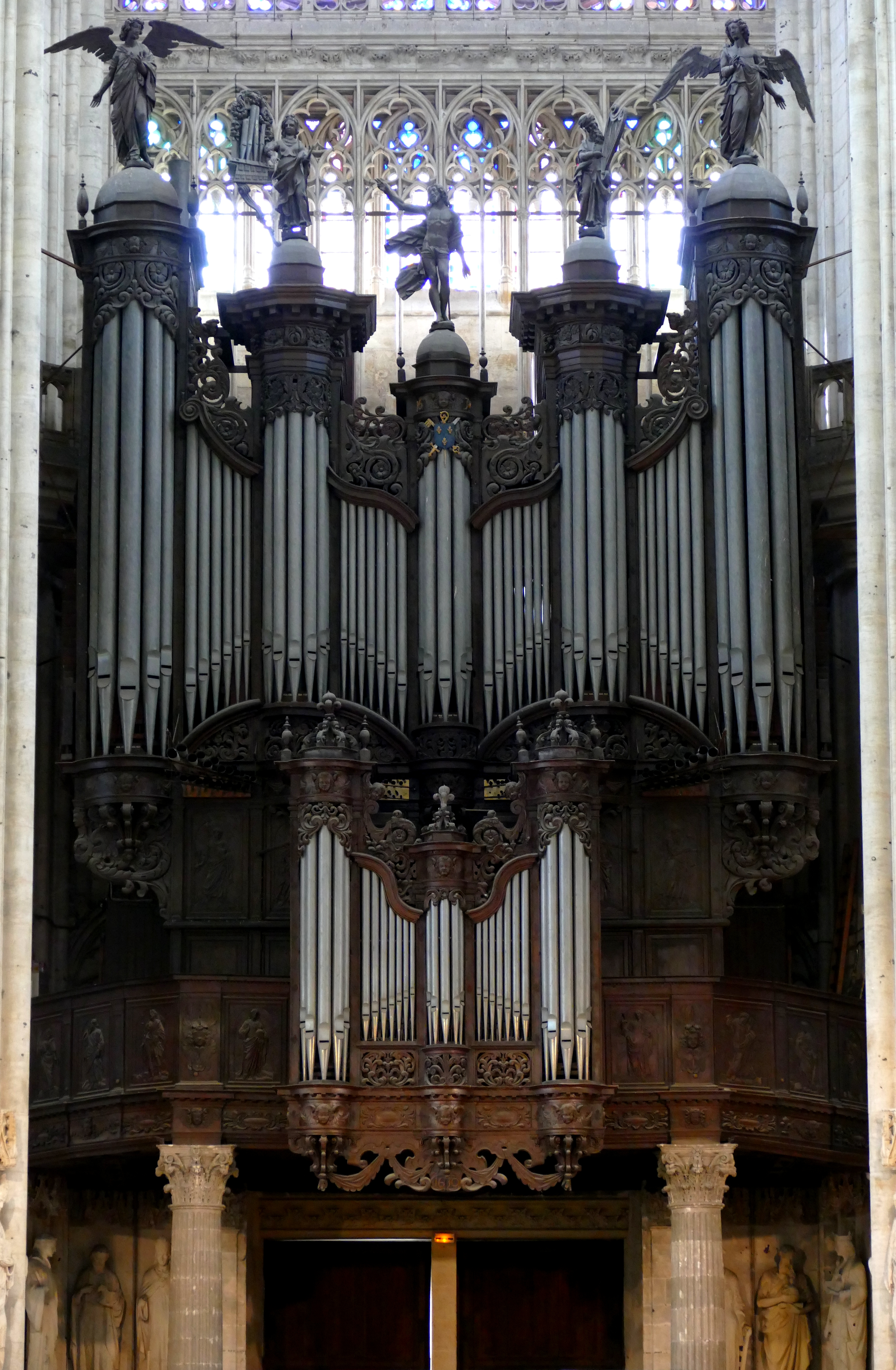 Buffet d'orgues, abbatiale Saint-Ouen (Rouen) 2016